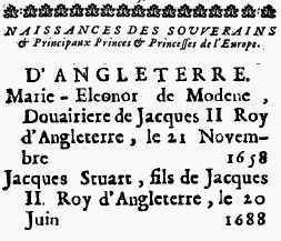 Extrait de l'Almanach royal de 1715 montrant l'oubli qui poussa l'éditeur, Laurent d'Houry, à la Bastille en 1716. Il avait oublié de mentionner le roi Georges.